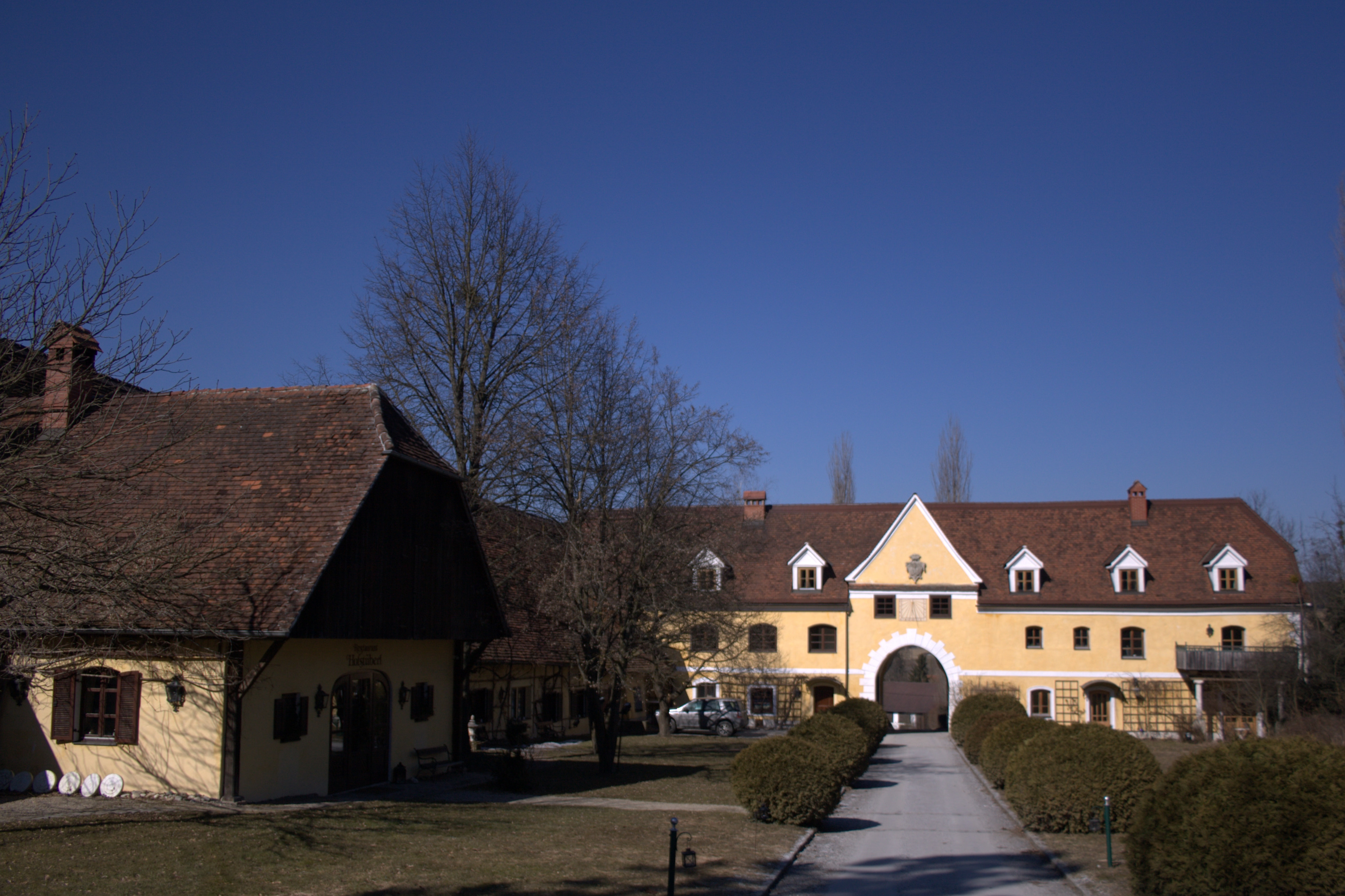 Schloss Obermayerhofen bei Sebersdorf Ansicht Hof